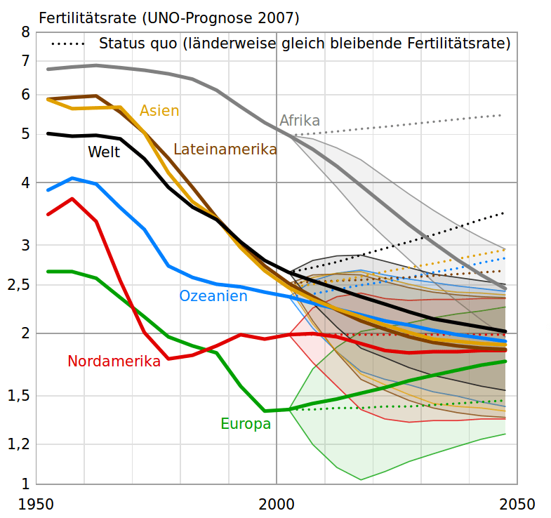 Diagramm: UNO-Fertilitätsratenanalyse und -prognose 1950–2050